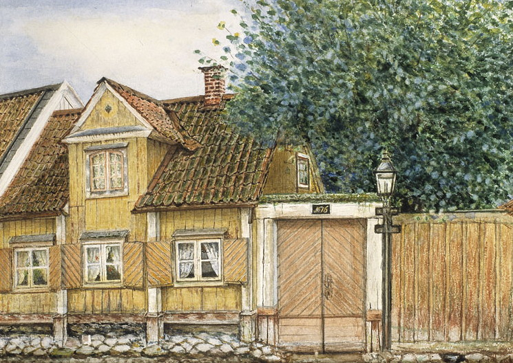 Törnquistska gården (Slaktargården), Tjärhovsgatan 16 (huset rivet 1882)